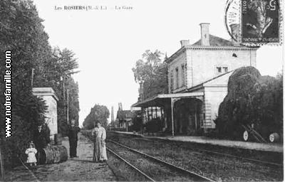 La Gare des Rosiers-Sur-Loire au XXième siècle du temps des locomotives à vapeur.